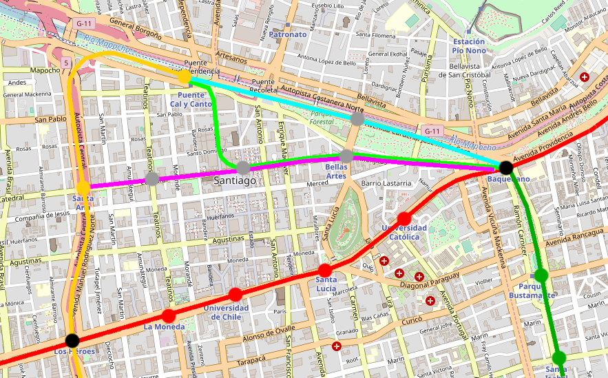 Trazados propuestos en marzo de 1995 para la extensión de la Línea 5 del Metro de Santiago: Propuesta 1 Propuesta 2 Propuesta 3 Estaciones proyectadas Línea 1 Línea 2 Línea 5 Estaciones de combinación existentes This map may be incomplete, and may contain errors. Don't rely solely on it for navigation.